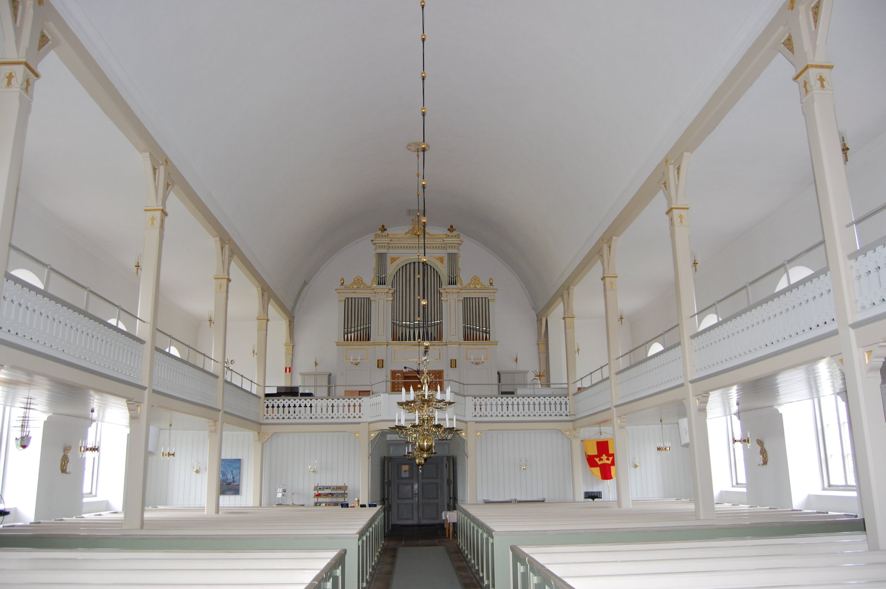 Kirche von Högby, Innenraum, Blick zur Orgel